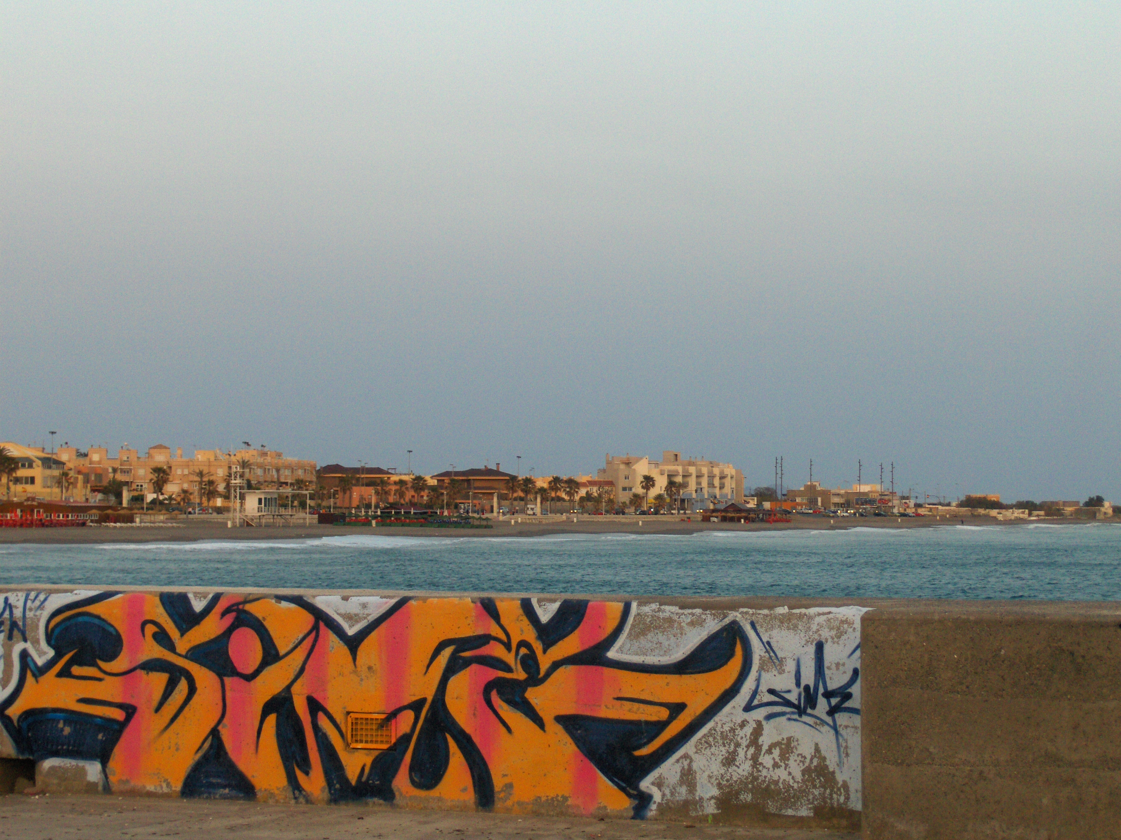 Barrio de Nueva Almería, al atardecer